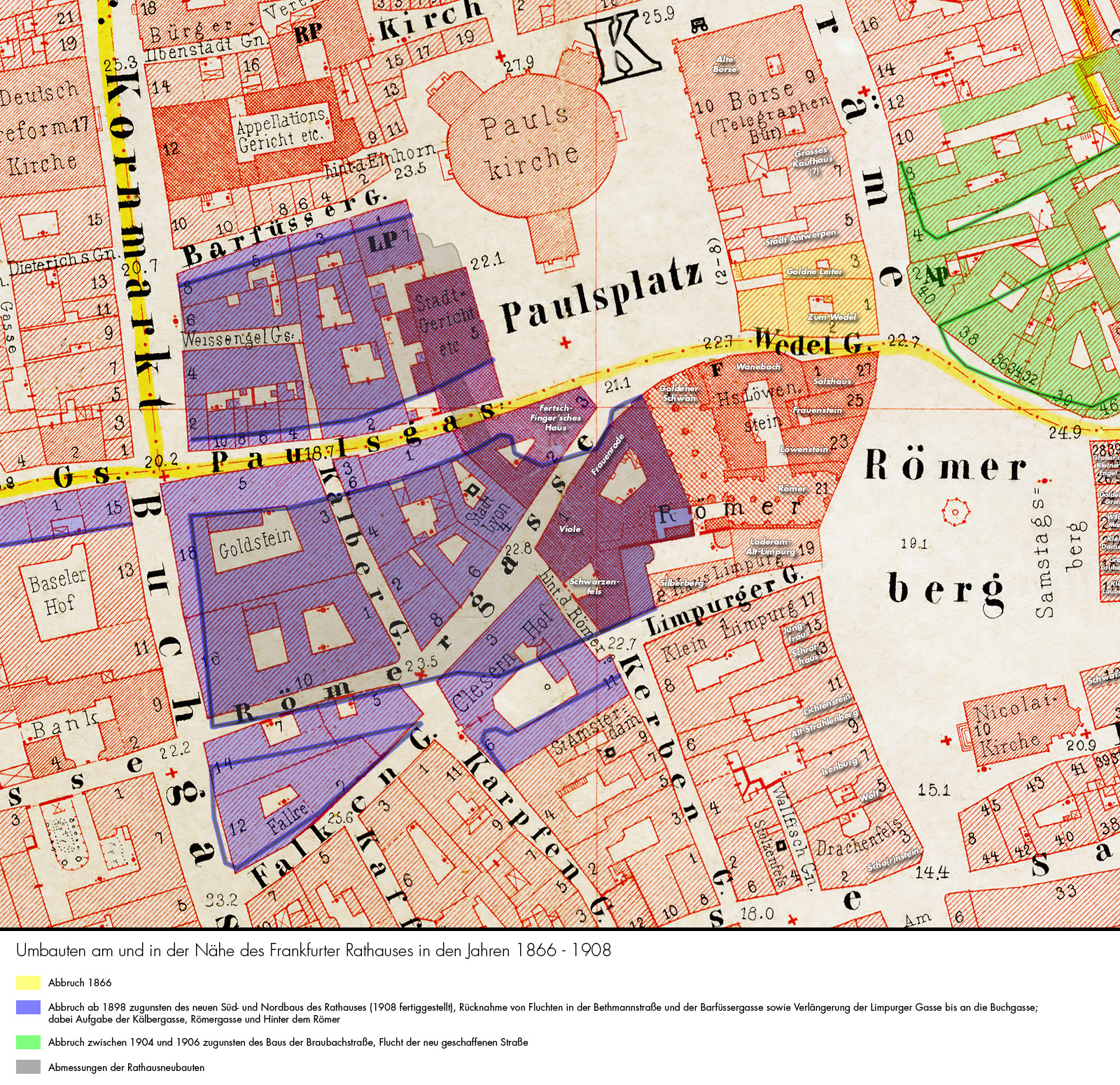 Römer in der Altstadt von Frankfurt am Main im baulichen Umfeld. Ausschnitt aus dem Ravenstein-Plan Frankfurts aus dem Jahr 1862. Chromolithographie, gescannt und digital nachbearbeitet, bauliche Veränderungen der Jahre 1866–1908 wurden farblich hervorgehoben (vgl. Legende). Da der Plan auf nicht säurefreien Papier gedruckt wurde, sind trotz Nachbearbeitung die Zeichen deutlicher Alterungsspuren zu sehen.